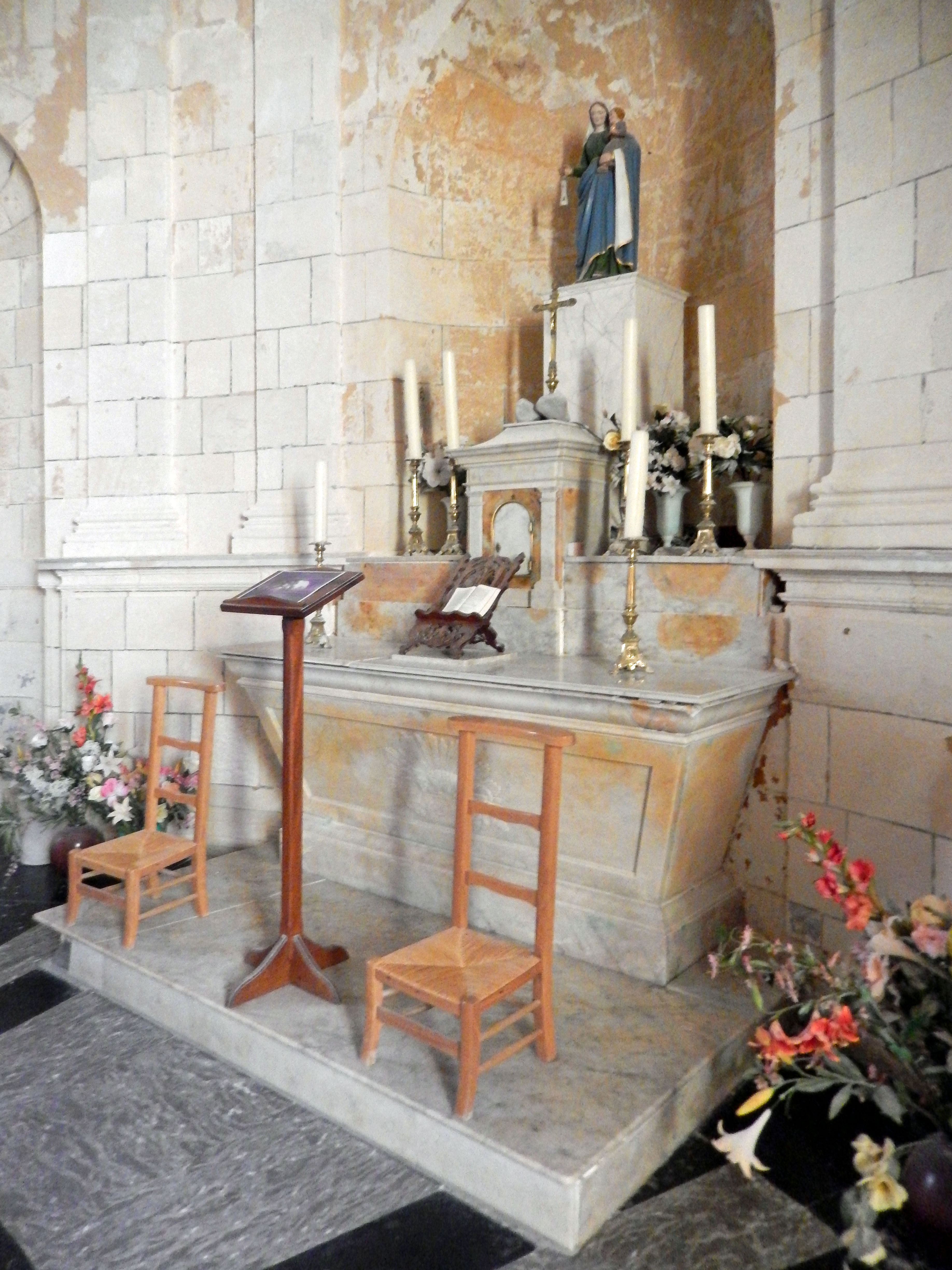 2014-09-27 Le Verdon, Gironde, phare de Cordouan, chapelle